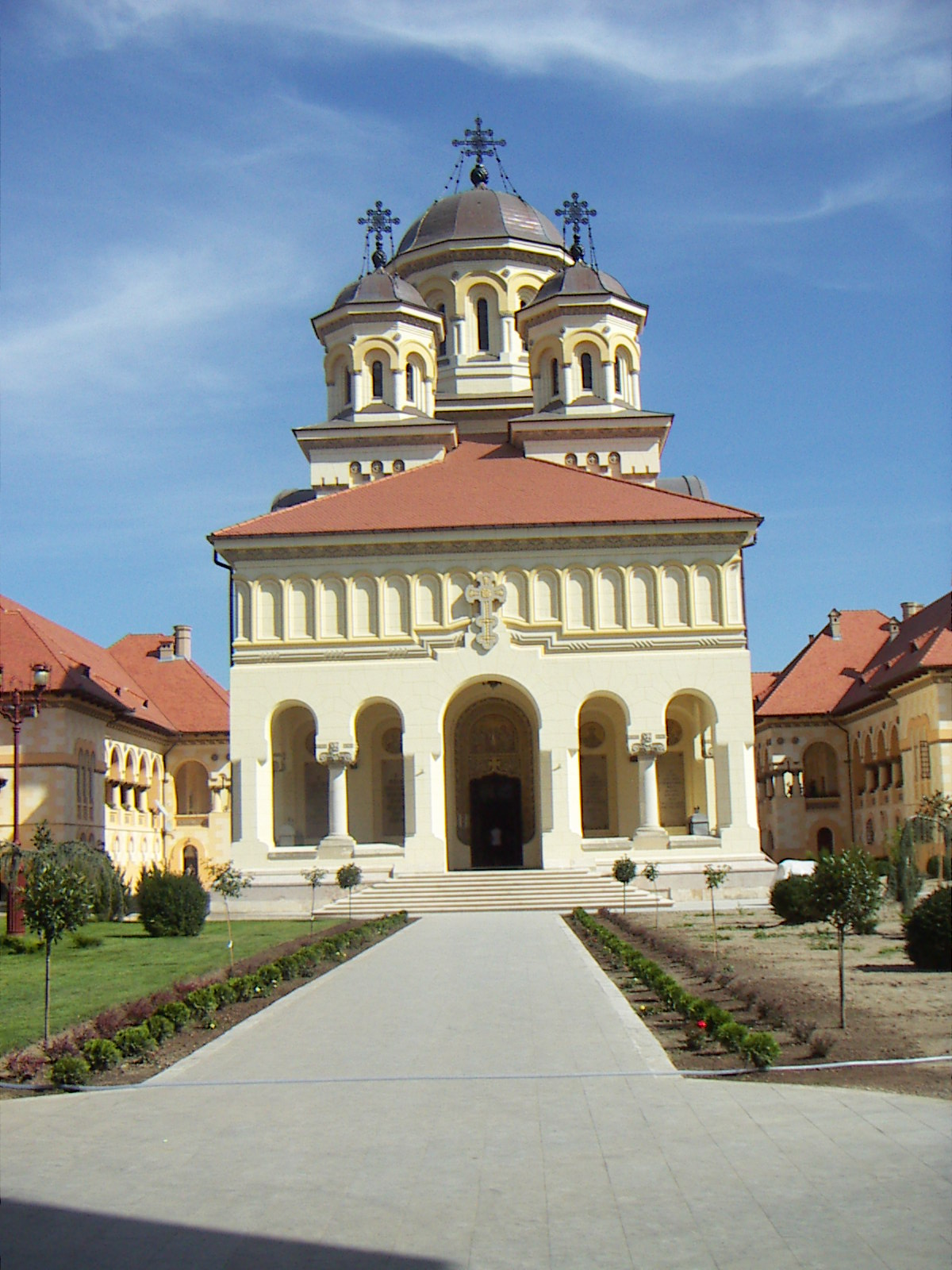 Catedrala "Sf. Treime" din municipiul Alba Iulia, Str. Mihai Viteazul, 16, construită între 1921 - 1922 01